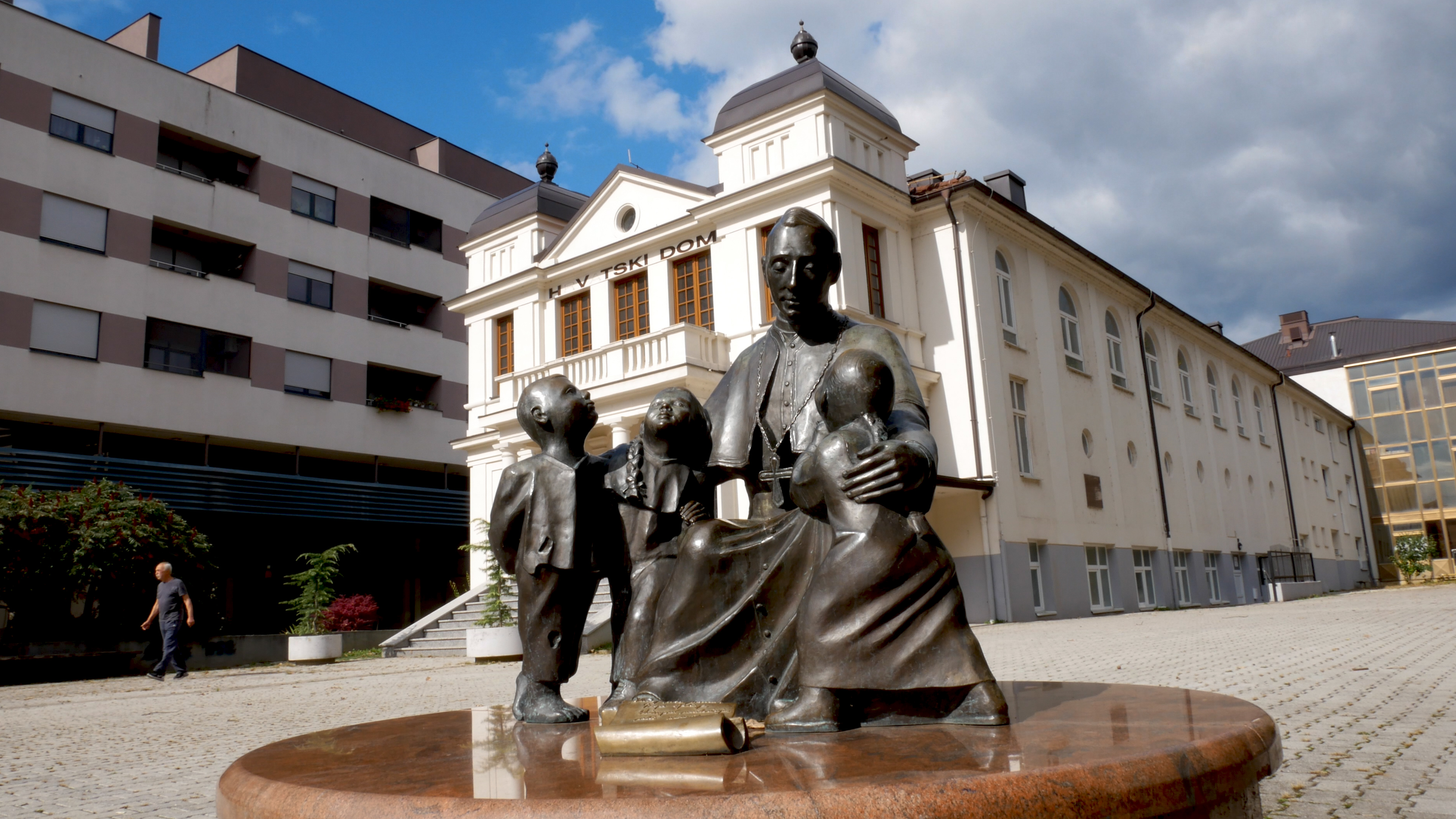 Hrvatski dom u Slavonskom Brodu